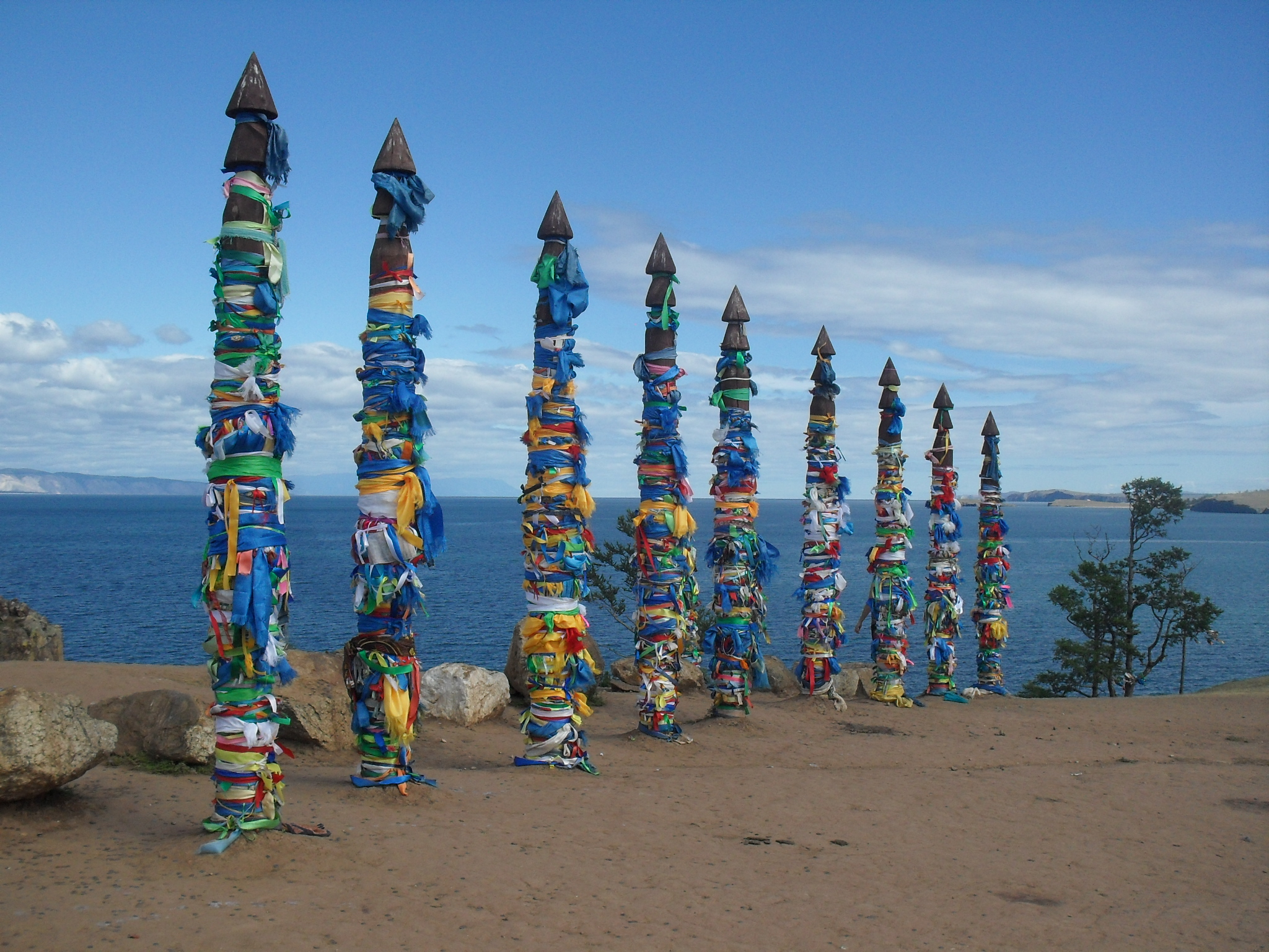 Мыс Бурхан (Скала Шаманка), Ольхонский район This image is related to the protected area of Russia number 3810274